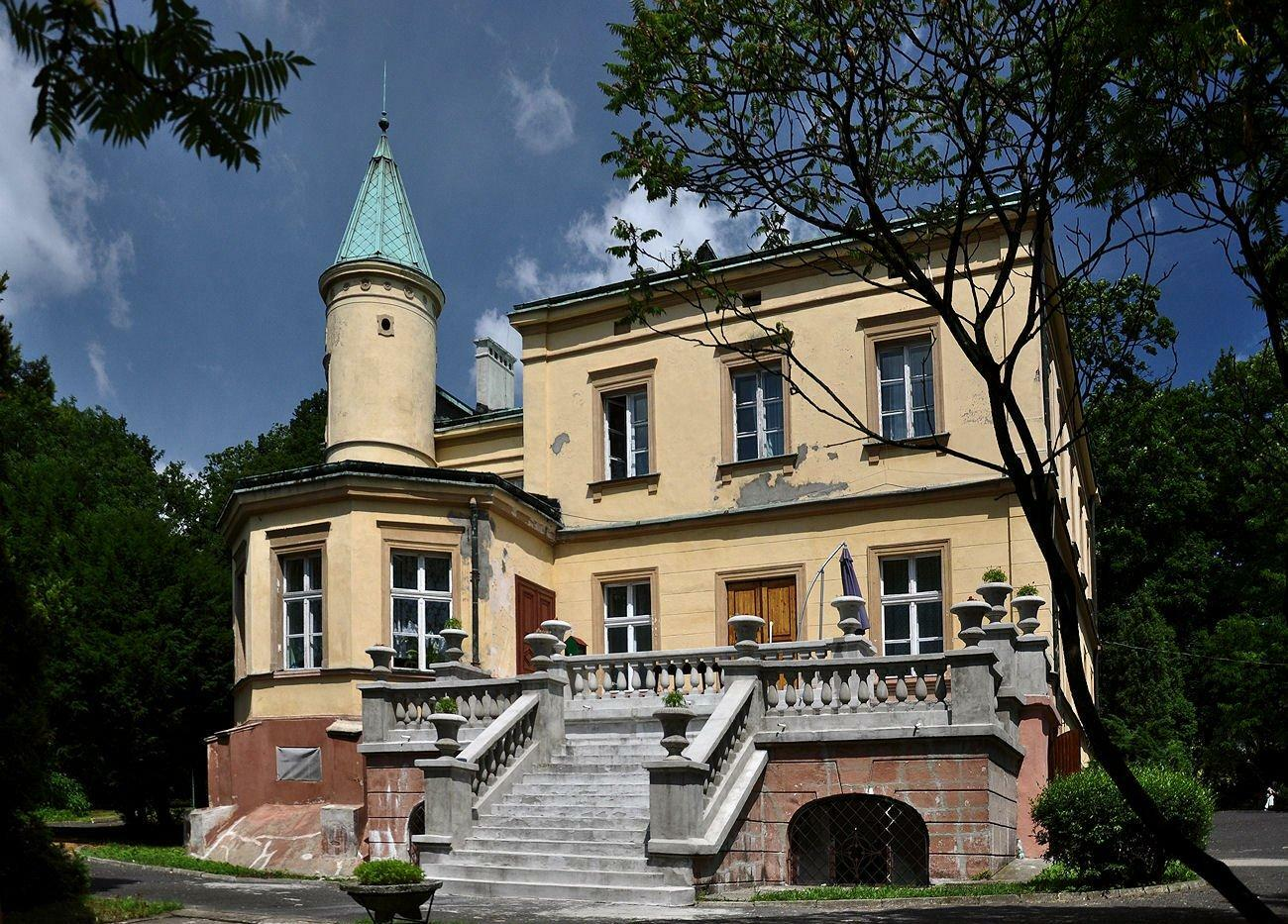 Pałac Ciechanowskich w Będzinie - widok od strony parku.